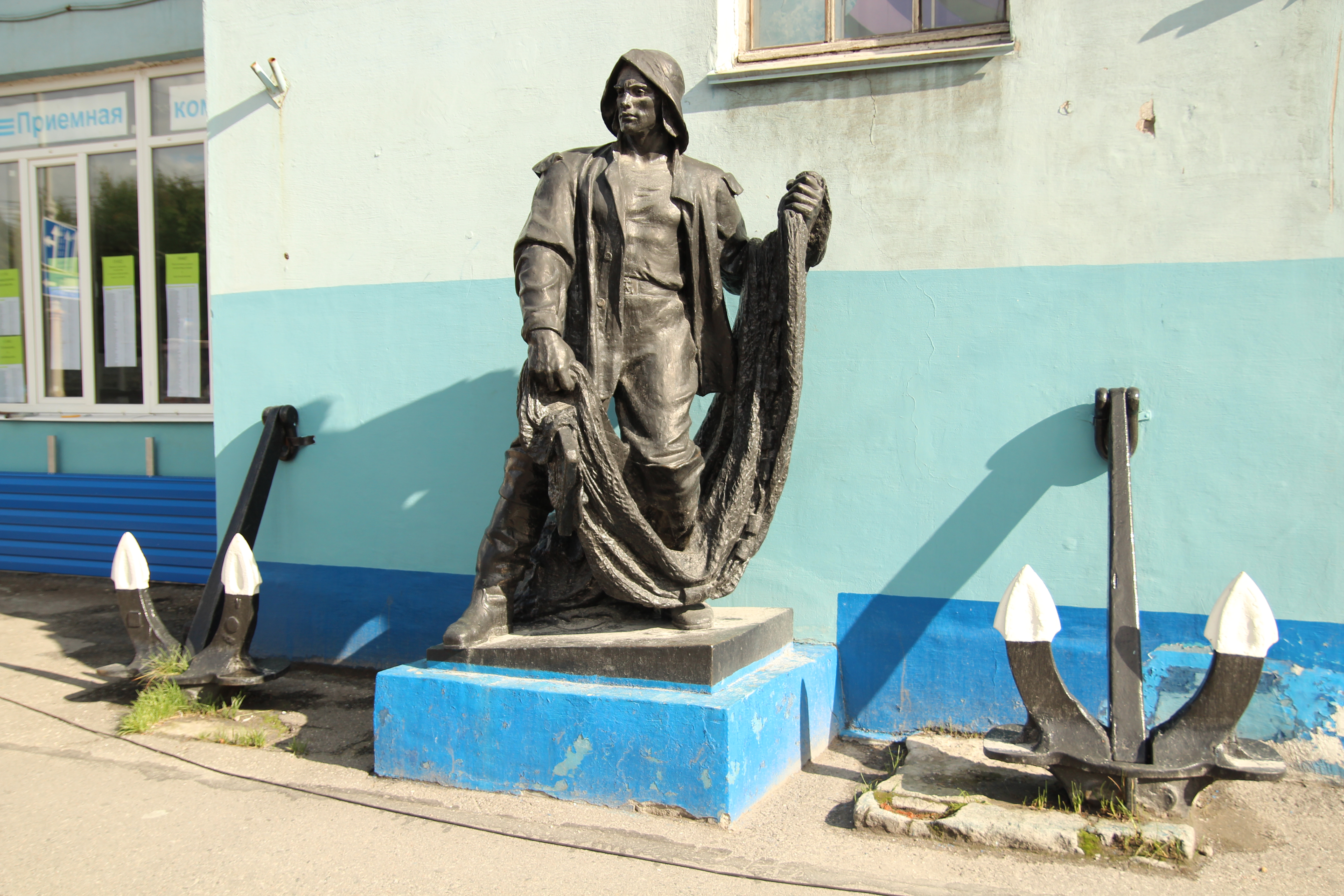 Скульптура рыбака у здания морского колледжа имени И. И. Месяцева